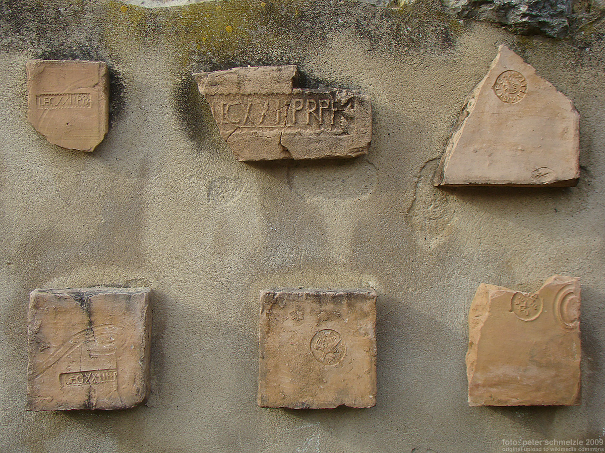 Römische Ziegelstempel aus Jagsthausen. Abgüsse im Römerbad Jagsthausen AE 1978, 518. AE 1994, 1306.